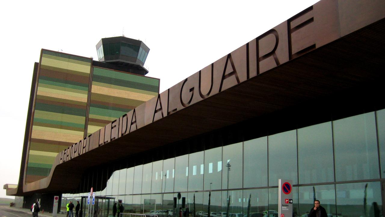 Aeroport de Lleida-Alguaire